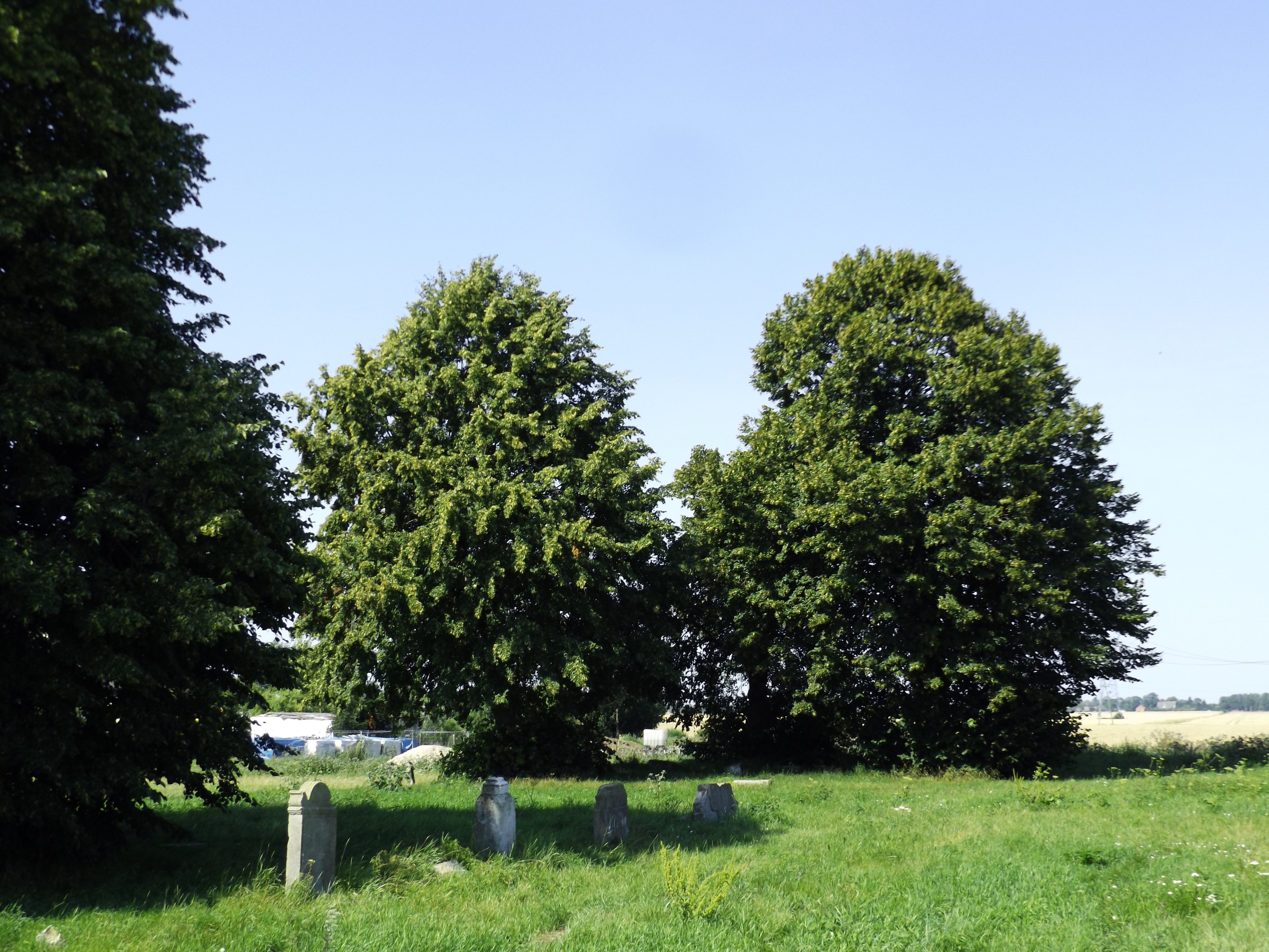 Pozostałości mennonickiego cmentarza we wsi Niedźwiedziówka